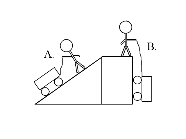 Illustration för att visa på "Mekanikens gyllene regel".